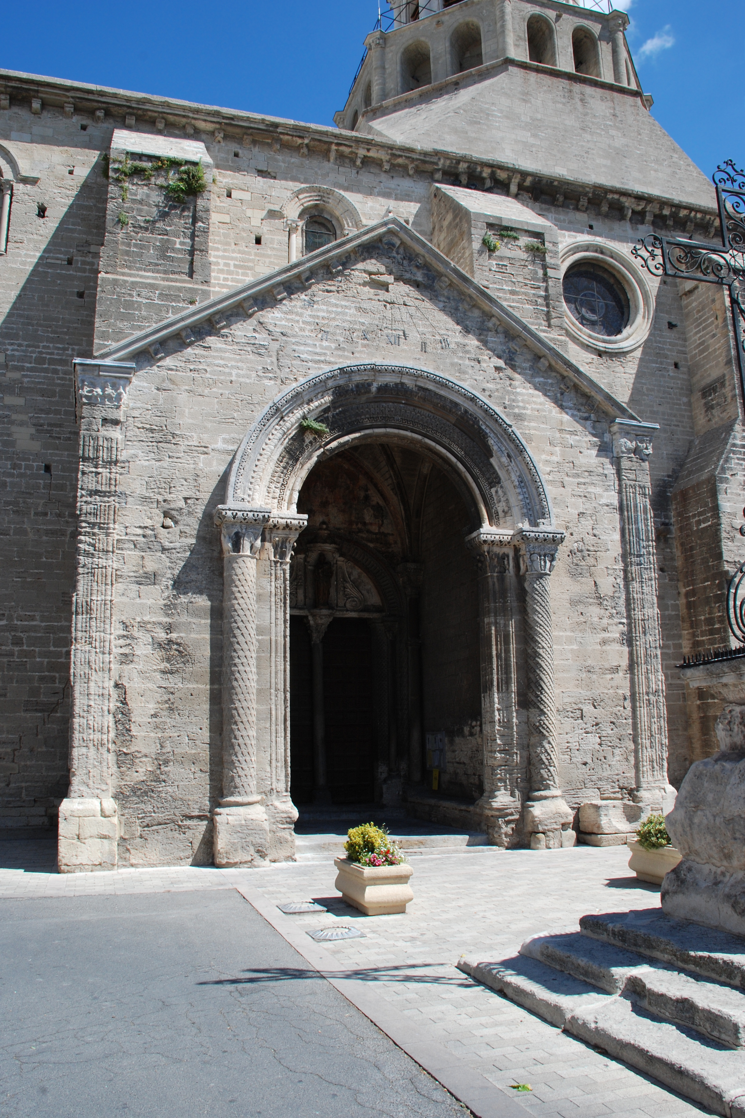 France - Vaucluse - Le Thor - Église Notre-Dame-du-Lac